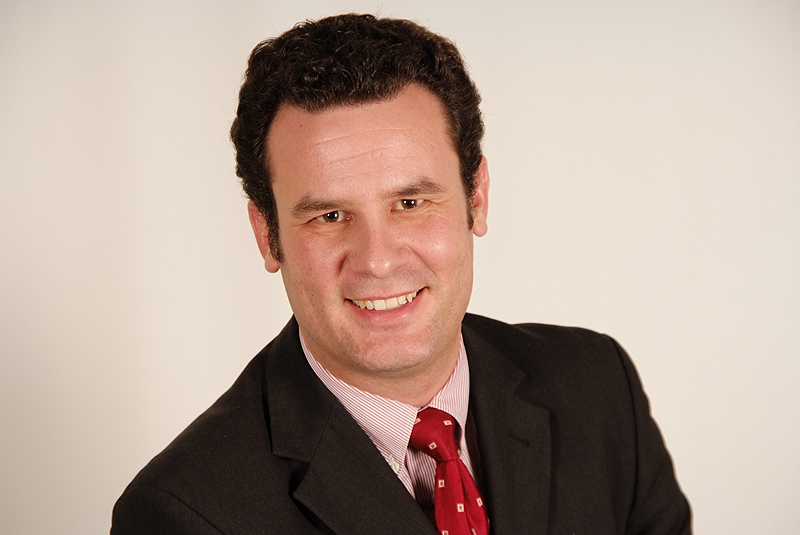 Matthias Nerlich, Landtagsabgeordneter Niedersachsen, 16. Wahlperiode (Fotoprojekt Landtagsabgeordnete Niedersachsen am 24. und 25. November 2009)